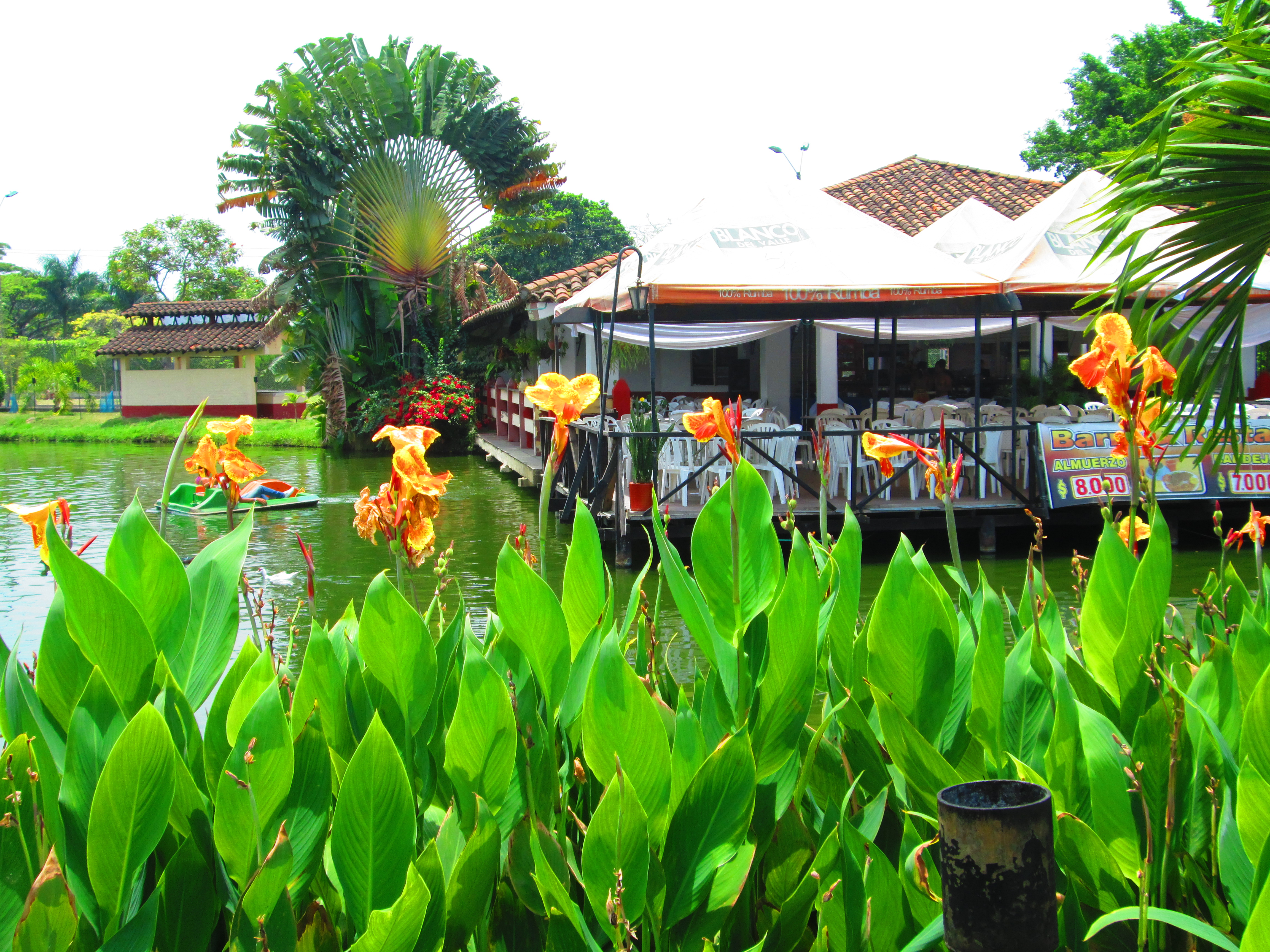 Parque de la caña